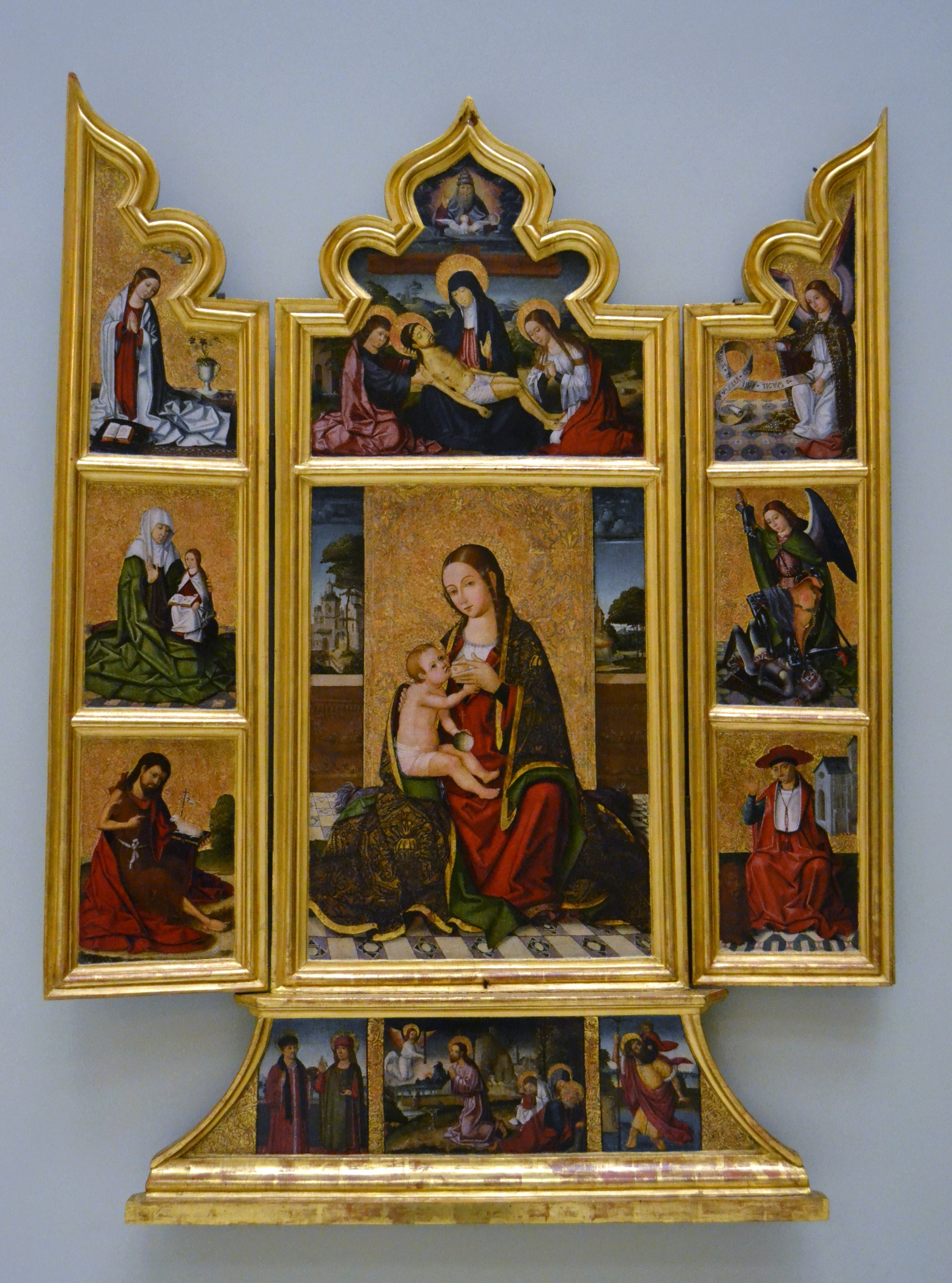 Esta obra, conocida como el Tríptico de la Virgen de la Leche, debió ser ejecutada hacia el año 1500, e ingresó en el Museo de Bellas Artes de Valencia en 1877 por legado de Juan Martínez Vallejo a la Real Academia de Bellas Artes de San Carlos.